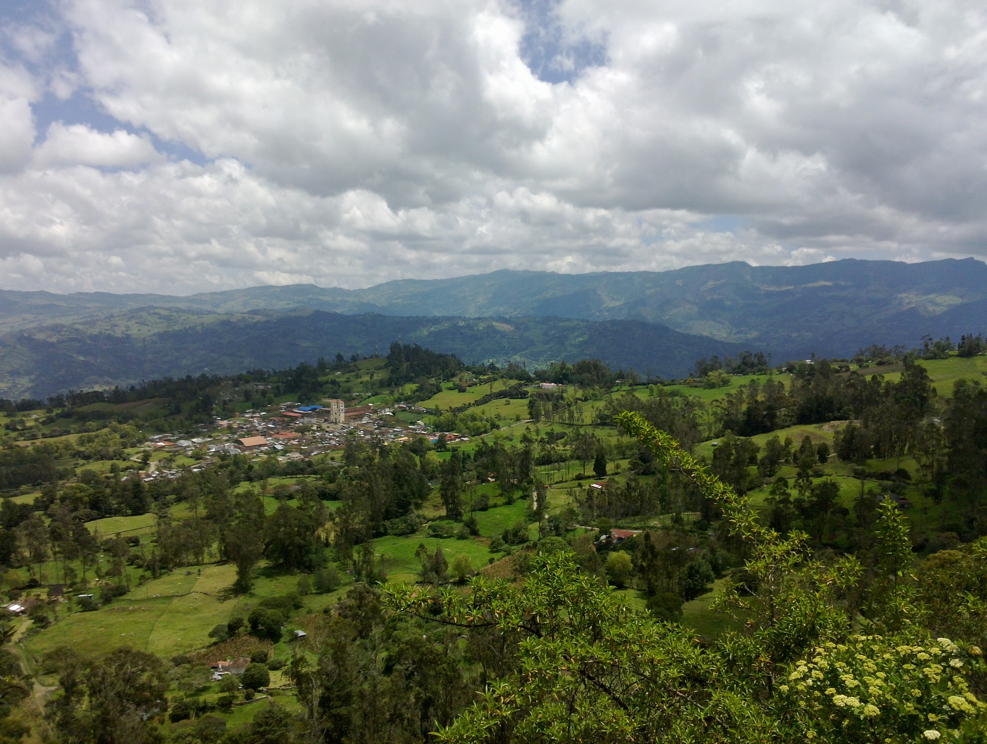 Ubicación: JUNIN, CUNDINAMARCA Vista de Junin desde el mirador del Parque Ararat o Parque Alemania